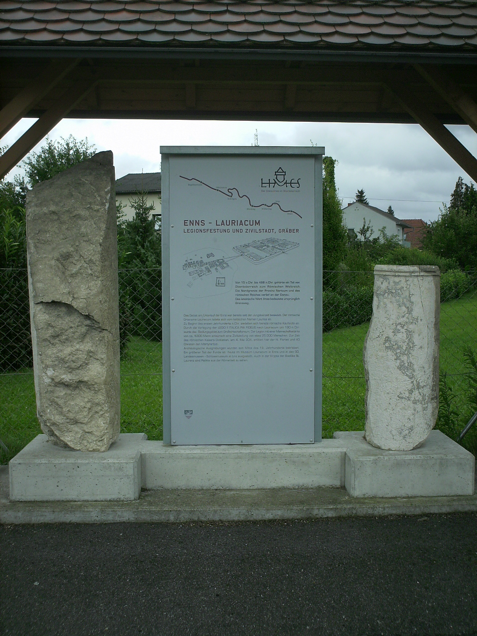 Station Via Principalis/Kirchenareal Maria am Anger des Stadterlebnisweges Enns mit Hinweistafel und römerzeitlichen Architekturteilen. (ArD-4-024 till 2012)